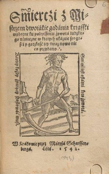 Karta tytułowa dzieła „Śmierci z Mistrzem dwojakie gadania...” (w wydaniu znajduje się Rozmowa Mistrza Polikarpa ze Śmiercią), Kraków, Maciej Scharffenberg 1542.